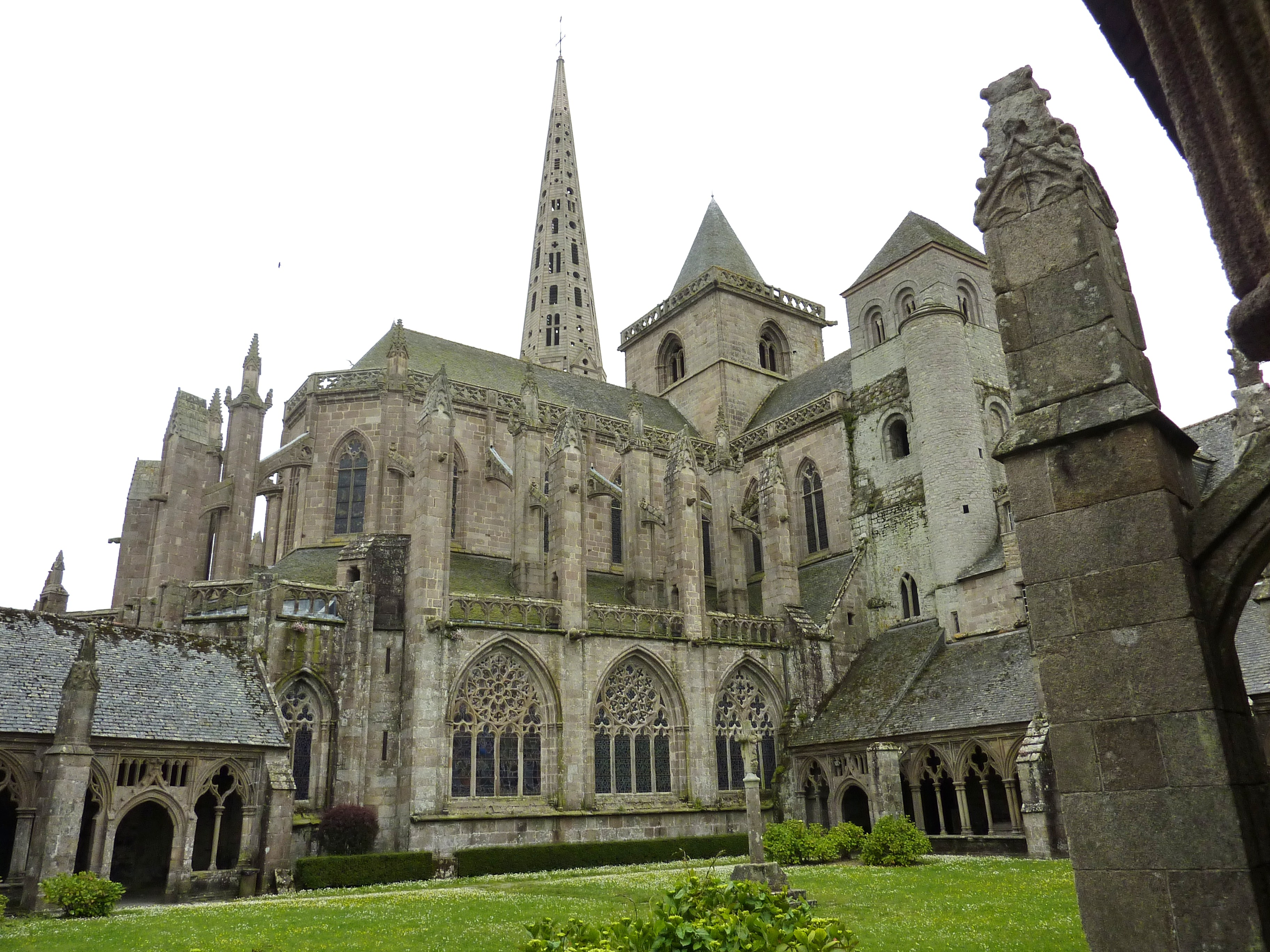 Tréguier : la cathédrale Saint-Tugdual. De gauche à droite: aile sud du cloître, flanc nord du choeur, flèche de la tour des Cloches, tours du Sanctus et Hastings, aile ouest du cloître.